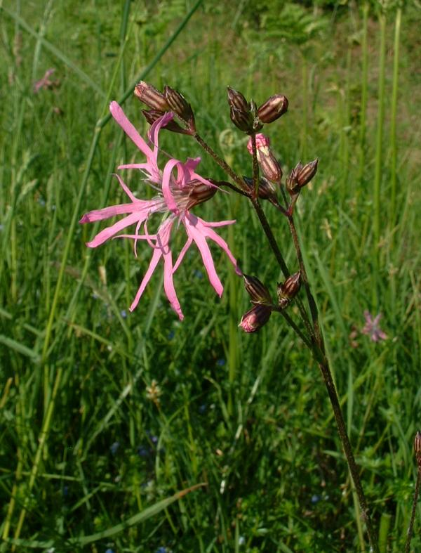 Lychnis fleur de coucou, photo J.F. Gaffard, Gy mai 2004, from wikipedia.